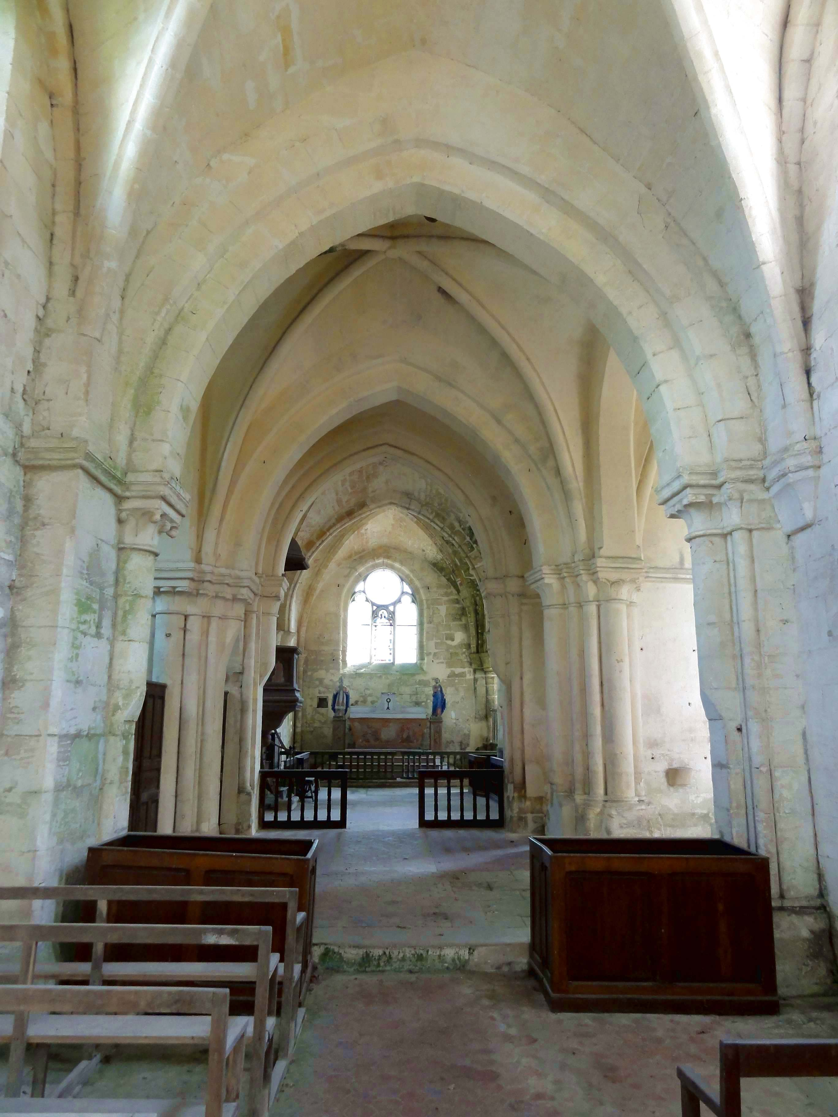 Intérieur de l'église - voir titre.